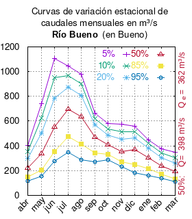 Curvas de variación estacional del río Bueno en Bueno. # Dirección General de Aguas # Diagnóstico y clasificación de los cursos y cuerpos de agua según objetivos de calidad. Cuenca del río Bueno. # Santiago de Chile # Ministerio de Obras Públicas (Chile) # 2004 # url: # urlarchivo: # Tabla 4.3: Río Bueno en Bueno (m3/s), pág. 46 mes 5% 10% 20% 50% 85% 95% abr 401.56 351.39 299.09 220.09 149.91 118.07 may 743.62 624.23 504.99 336.77 204.46 152.52 jun 1106.55 948.60 787.17 551.09 355.23 274.46 jul 1046.24 969.12 875.71 697.19 477.31 348.15 ago 977.94 901.87 809.72 633.62 416.71 289.30 sep 662.40 619.45 567.44 468.03 345.58 273.66 oct 578.78 536.28 488.96 409.82 329.72 290.18 nov 575.12 514.30 450.89 355.12 270.04 231.44 dic 556.04 514.56 464.32 368.30 250.04 180.57 ene 449.73 417.66 378.81 304.56 213.11 159.39 feb 373.82 341.29 303.67 239.01 172.88 140.58 mar 346.97 305.33 261.52 194.52 135.10 109.05 This plot was created with Gnuplot.